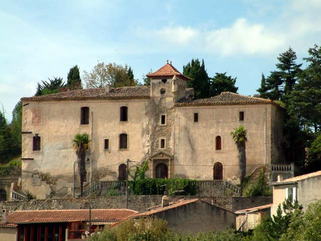 château de Montazels en 2005